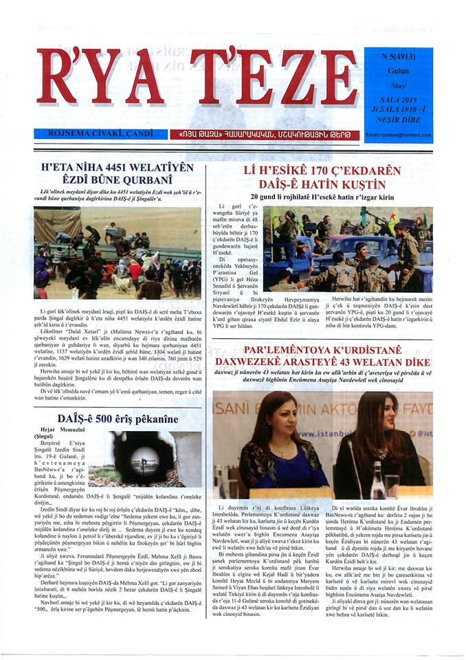 Kurdî: Rojnameya Riya Teze